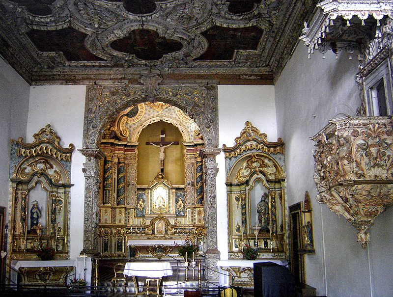 Interior da Igreja de Nossa Senhora da Misericórdia, em Olinda, Brasil.